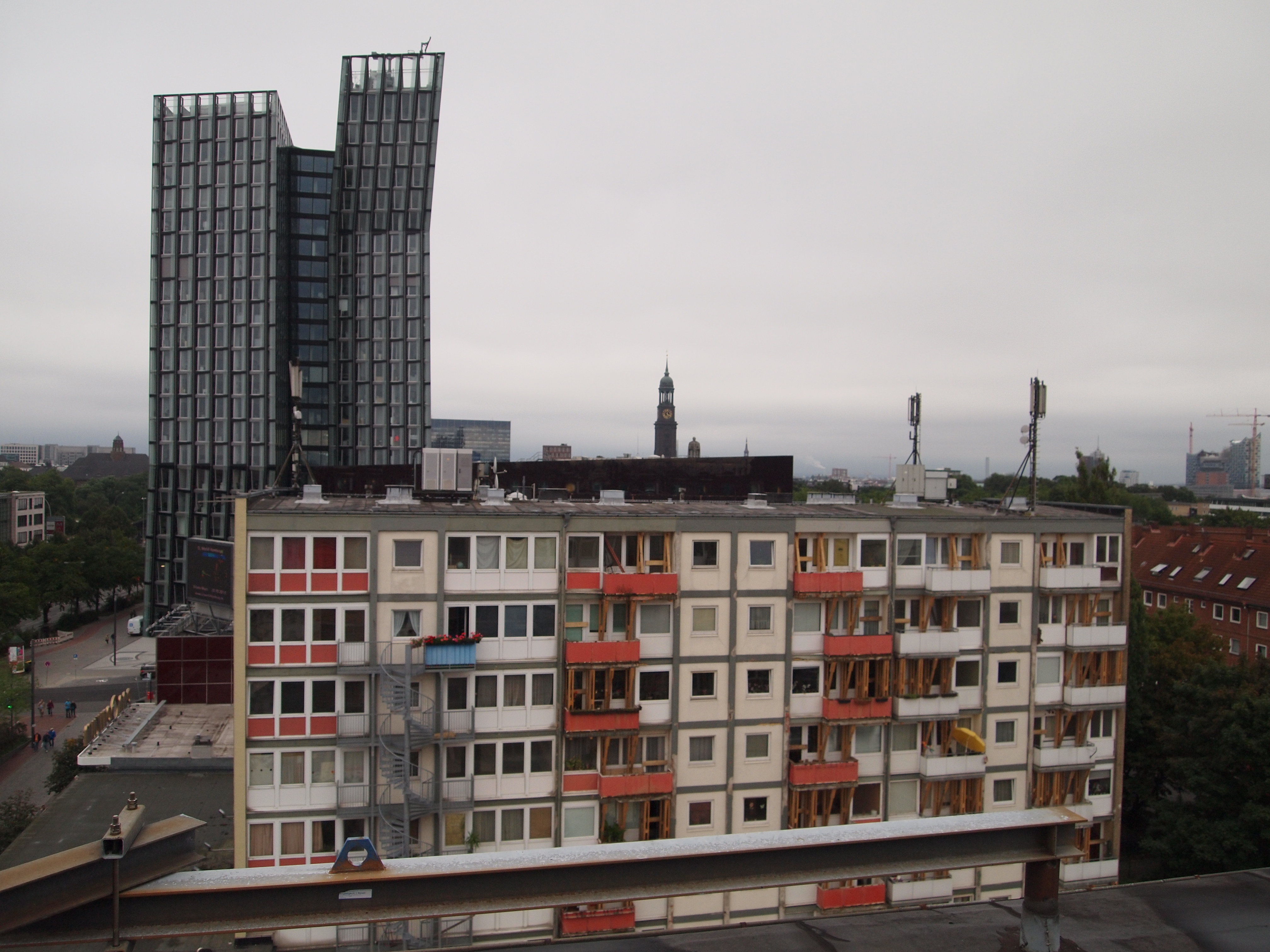 Essohäusern und Tanzende Türme, Skyline Hamburg St. Pauli: Michel, Bismarck, Elbphilharmonie